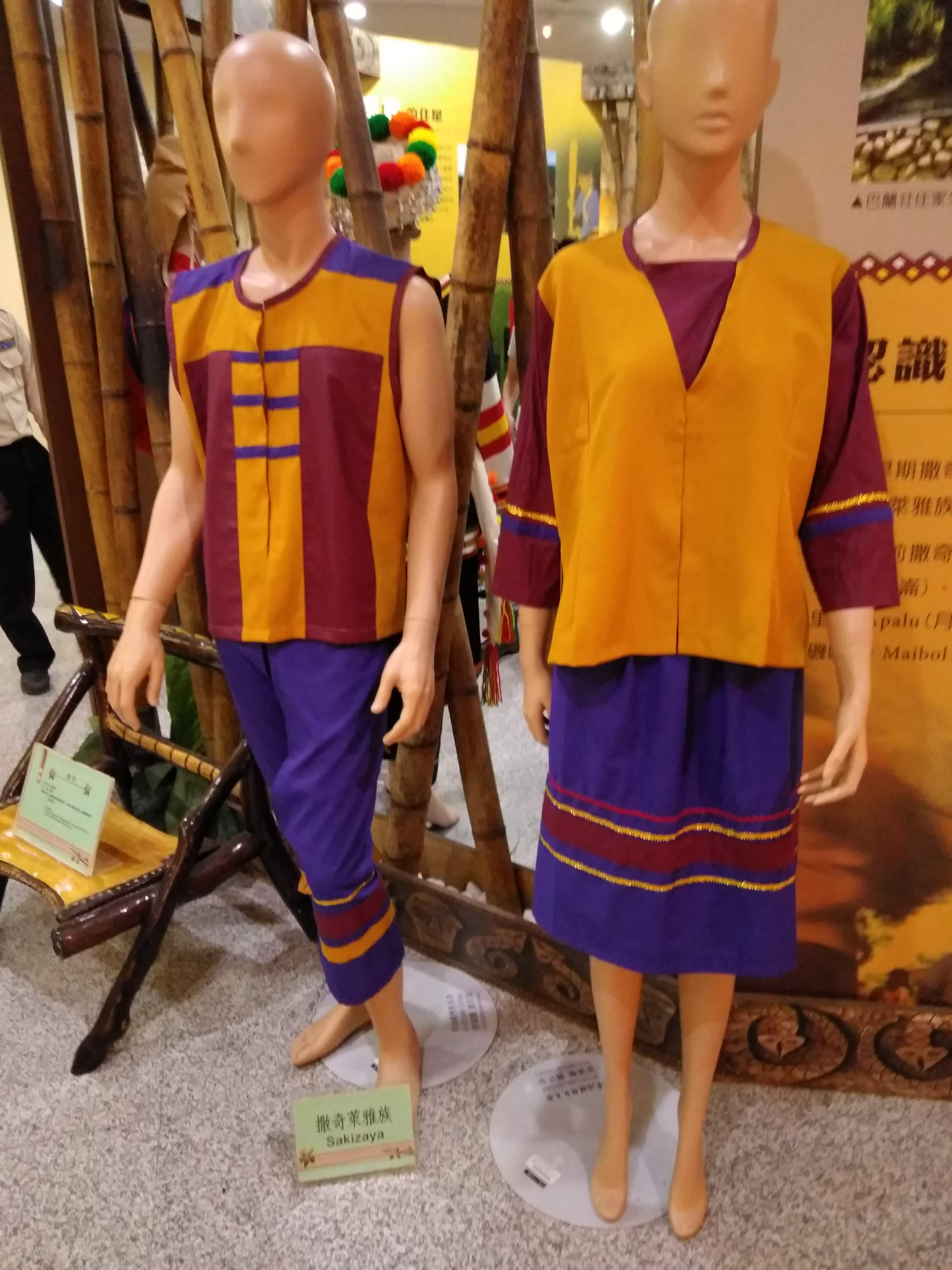 中文（台灣）: 台灣原住民服飾，撒奇萊雅族